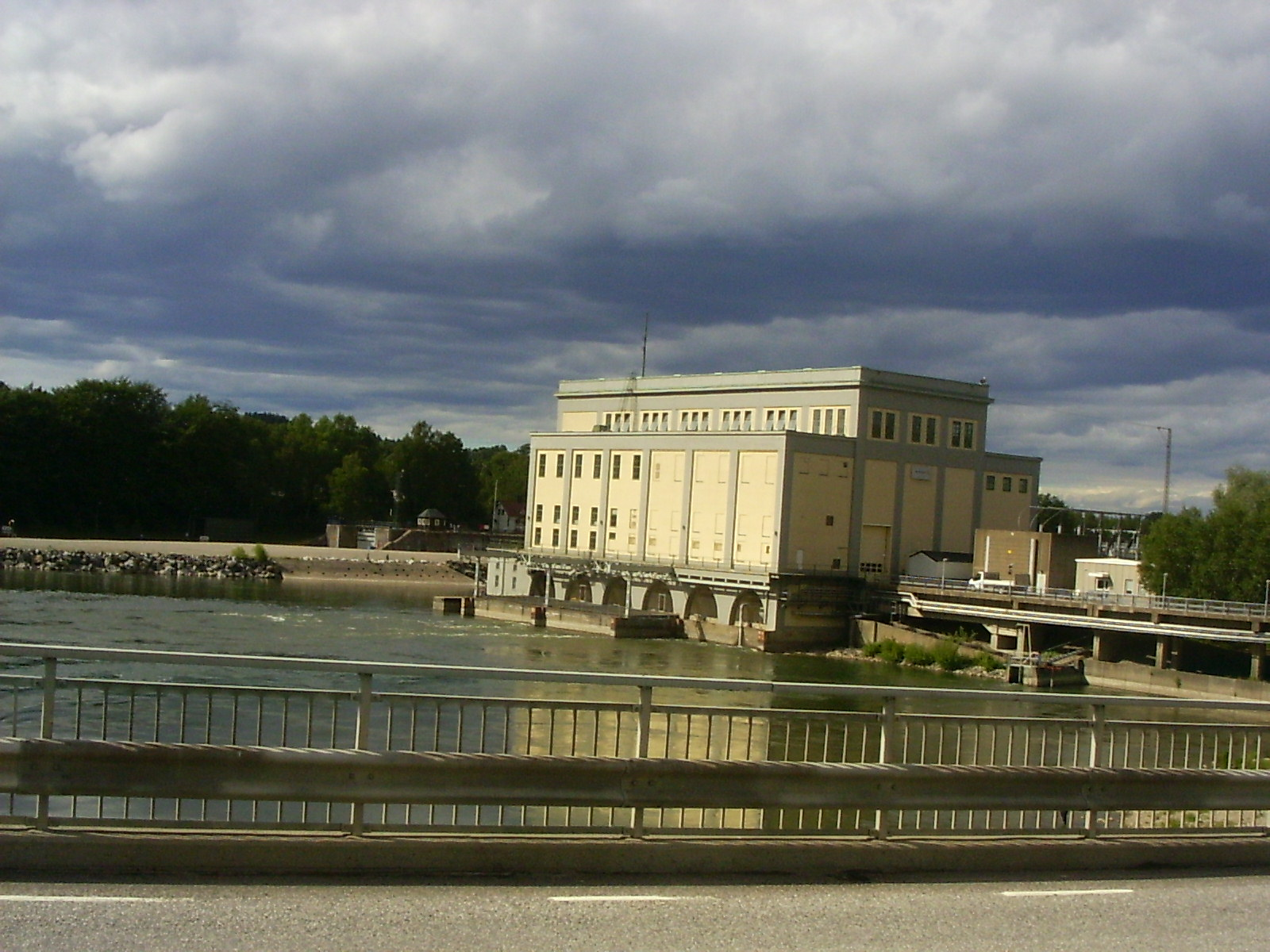 Vattenkraftstation (Västra Röd 1:9 Lilla Edets vattenkraftstation )